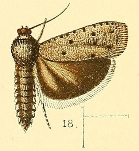 Phycodes punctata